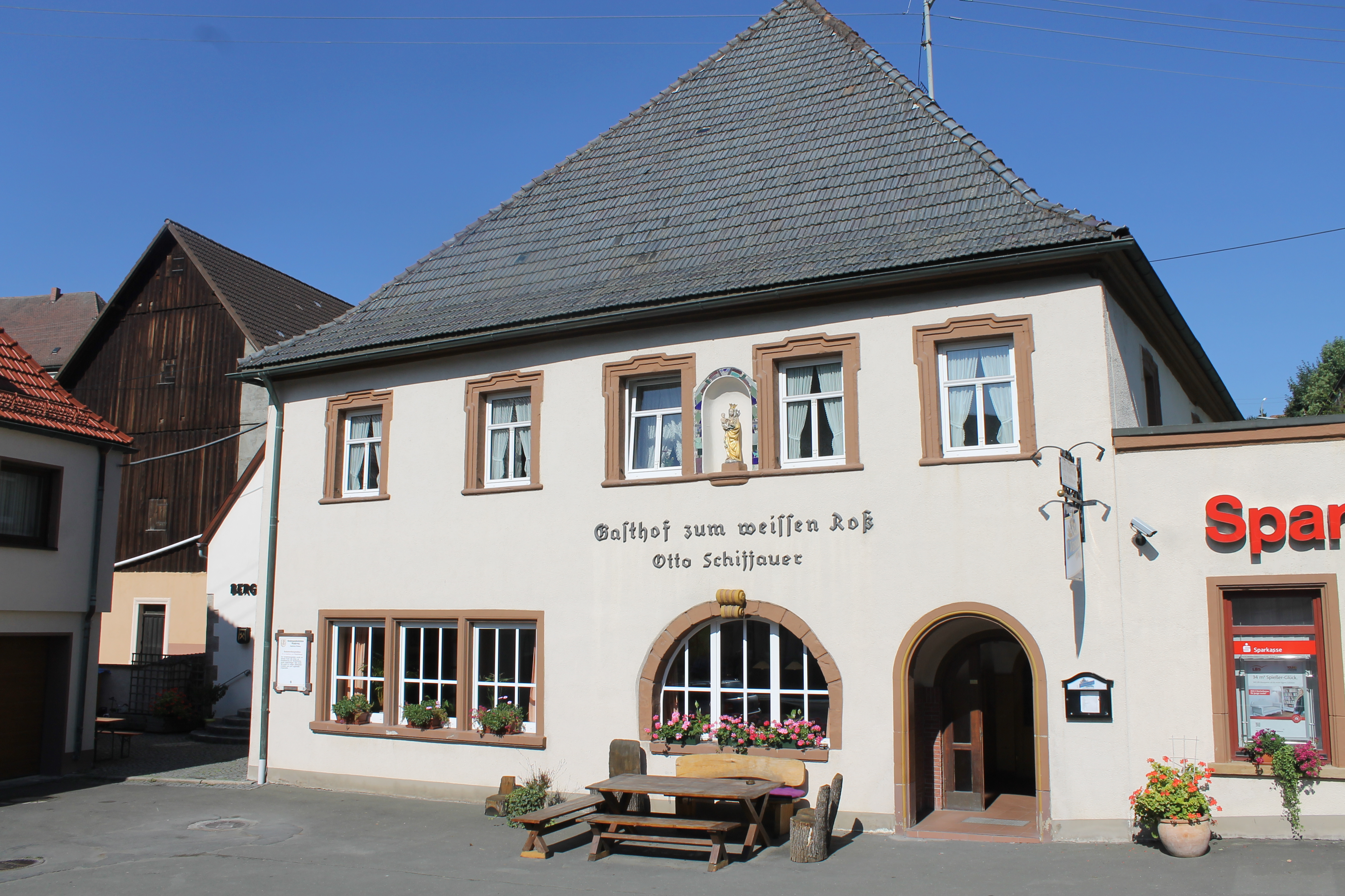 Vendégfogadó Kupferberg főterén